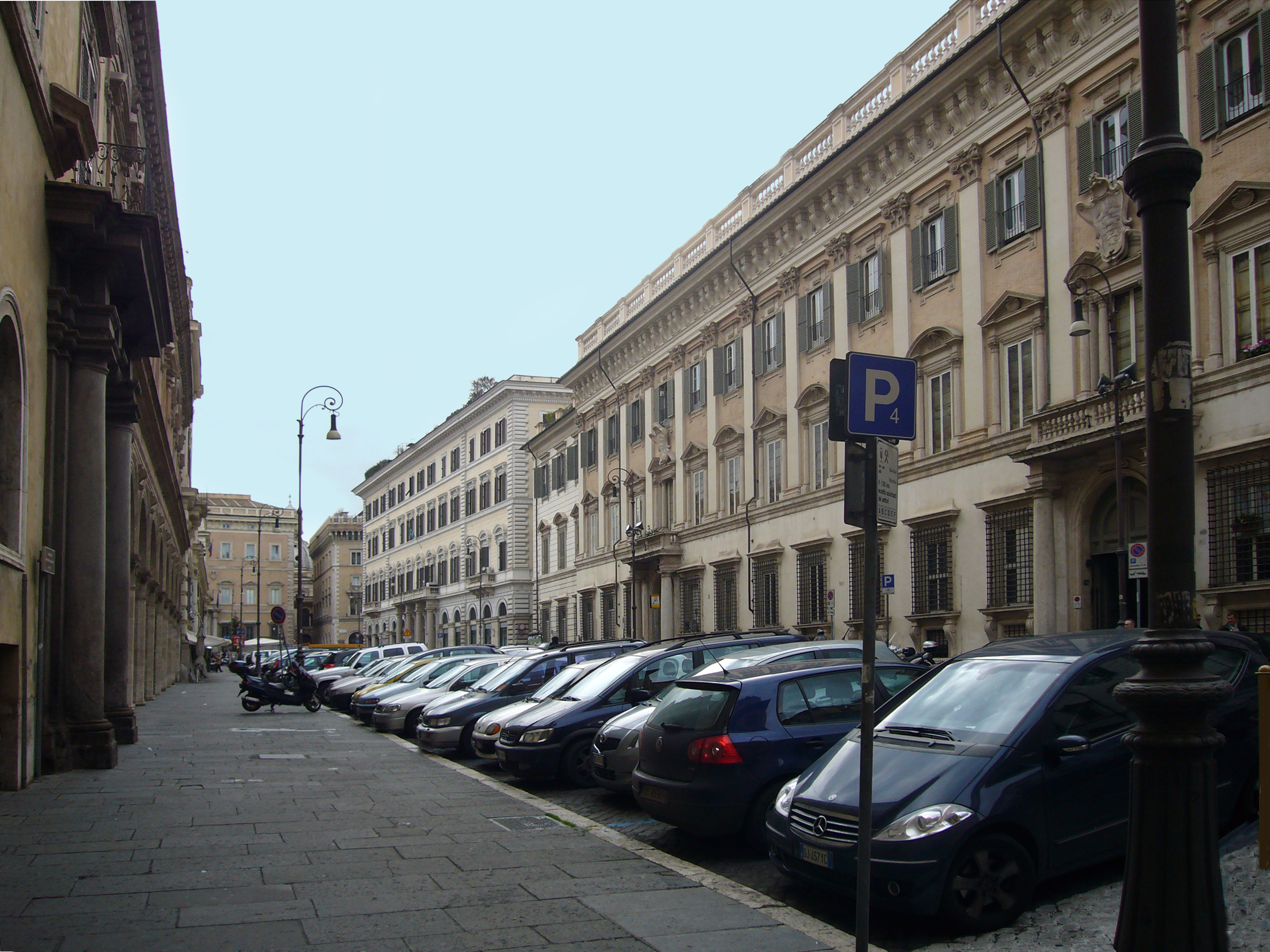 Roma, piazza santi Apostoli; a destra, palazzo Odescalchi (XVII sec.) e palazzo Guglielmi (Koch, XIX sec.)